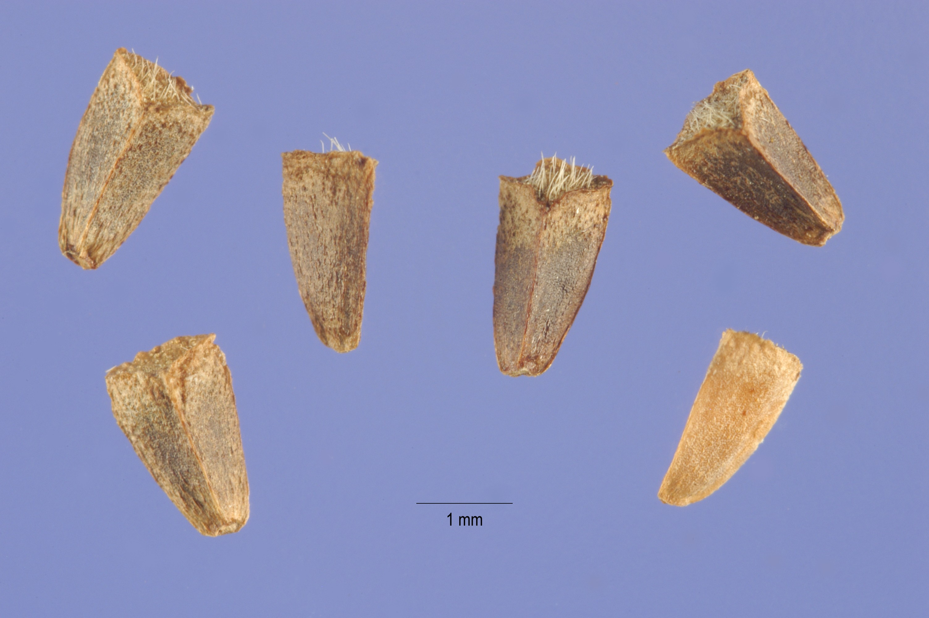 Leonurus cardiaca seeds